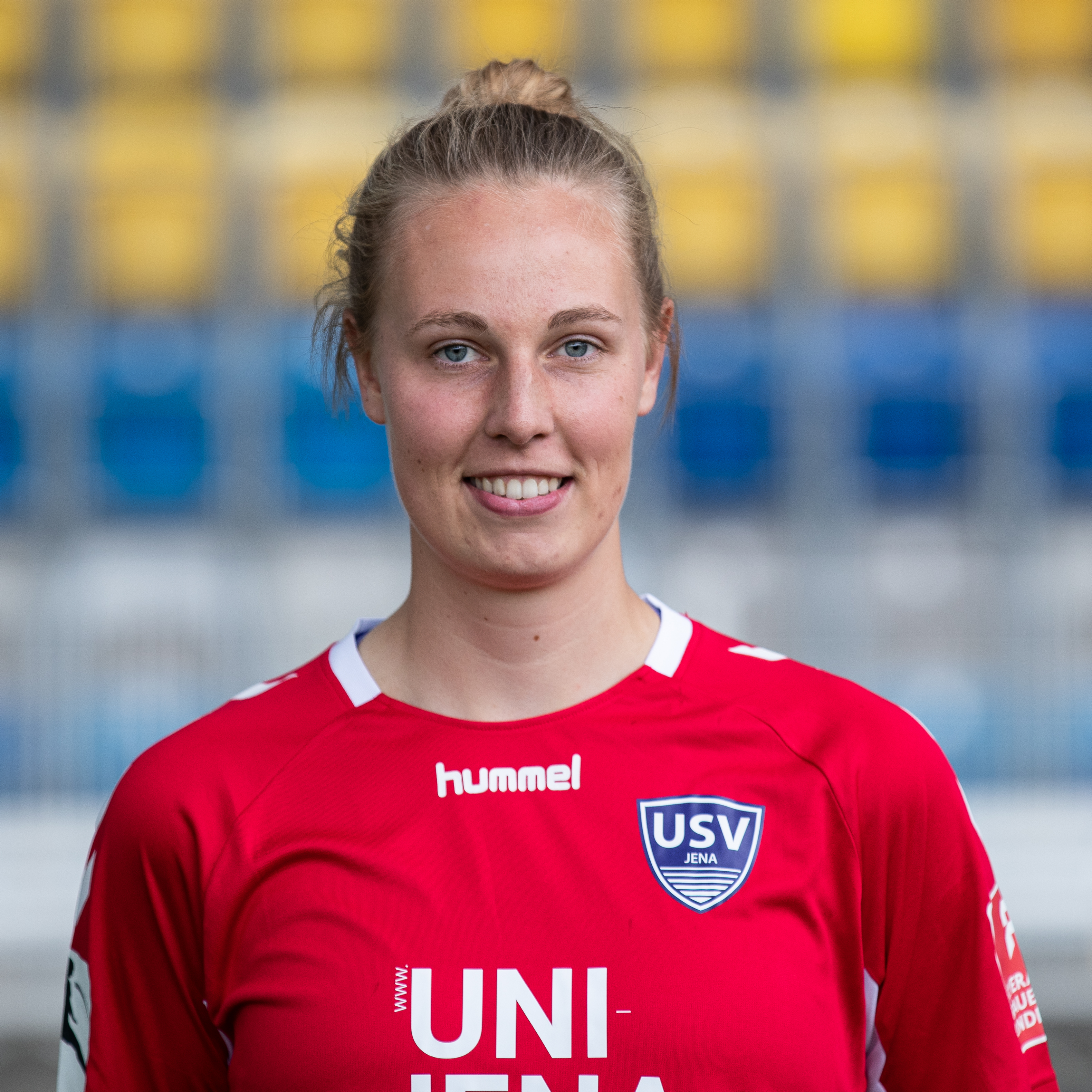 Fußball, Flyeralarm Frauen-Bundesliga, Mannschaftsfotos FF USV Jena; Sarah Hornschuch (FF USV Jena, 1, Torwart); Porträt, Einzelbild